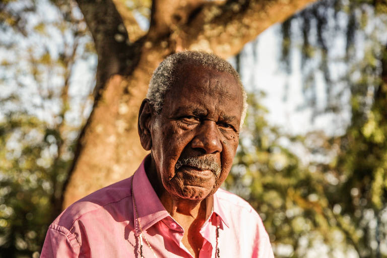 Poeta Carlos de Assumpção, por Renato Benichio